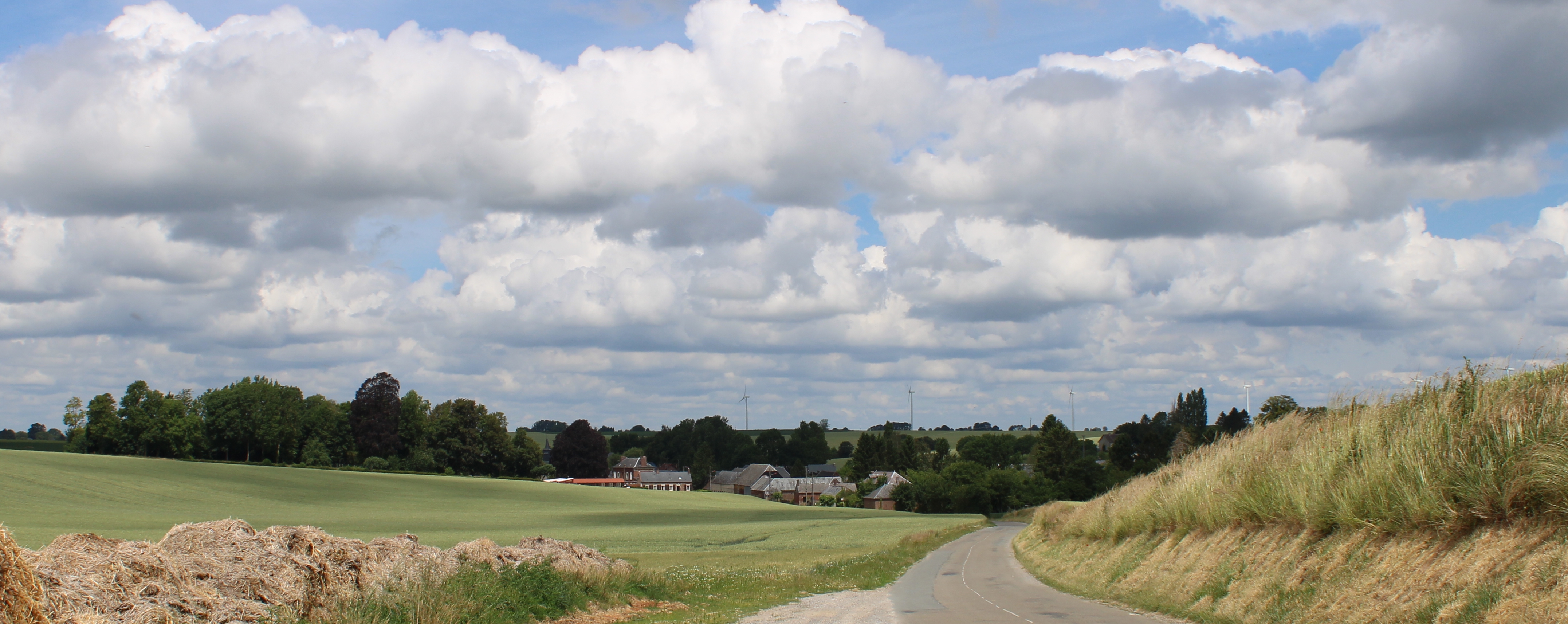 Panorama